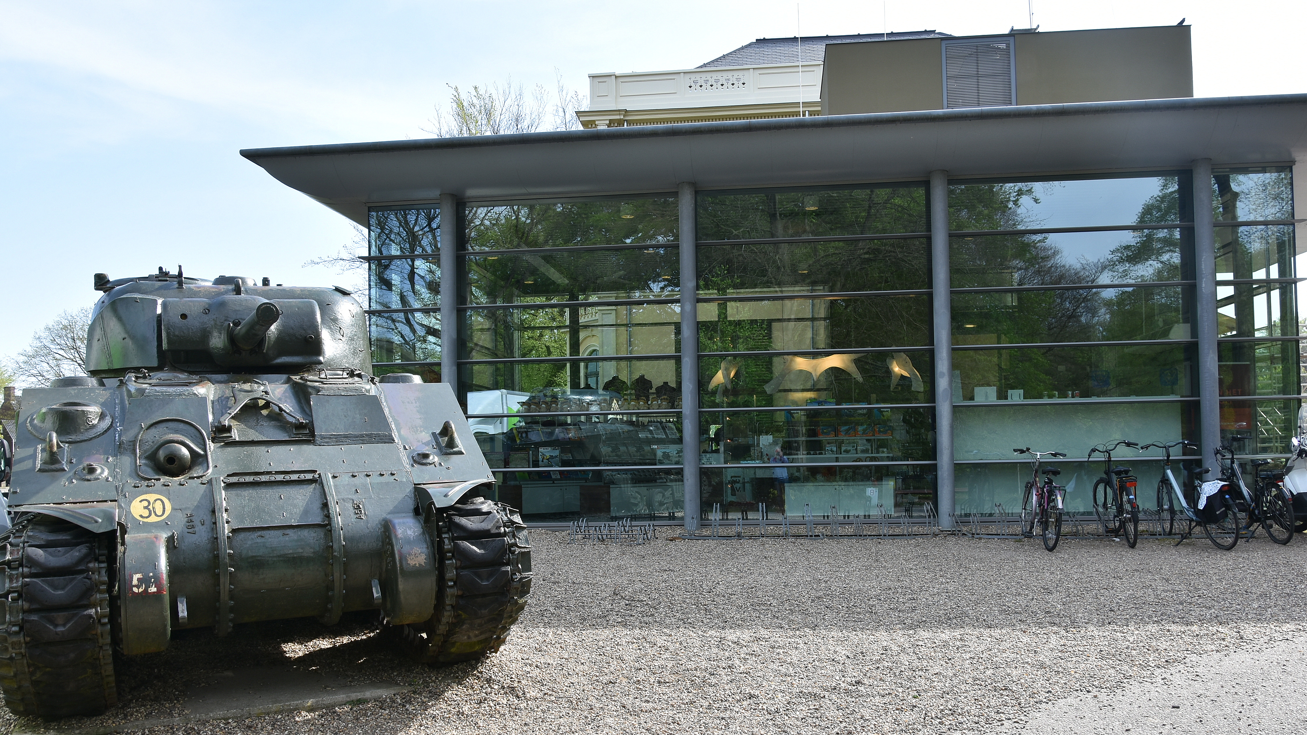 Airborne Museum Hartenstein Oosterbeek 23-04-2019 9-38-10